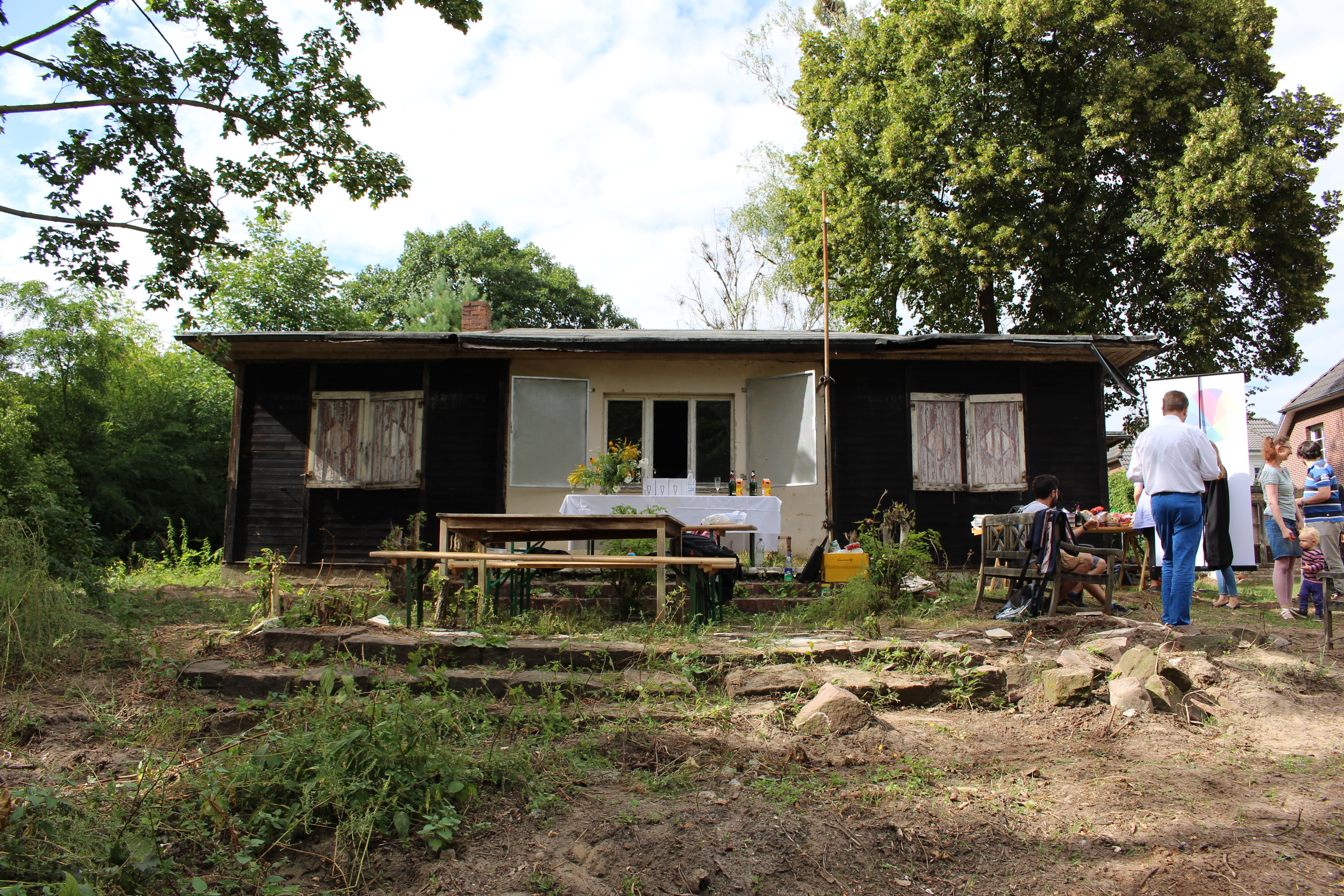 Alexander-Haus in Groß Glienicke (vom Groß Glienicker See gesehen)